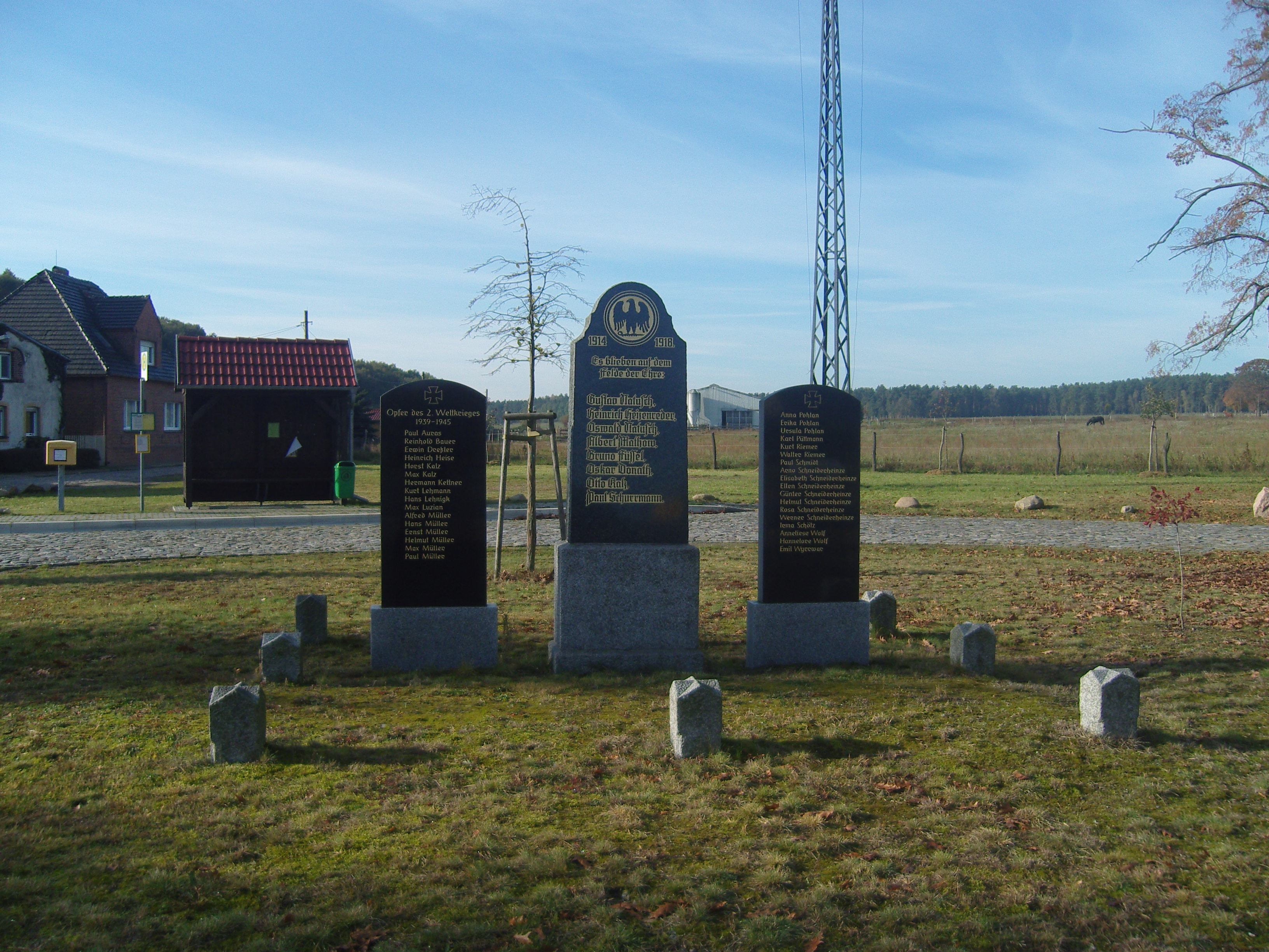 Kriegerdenkmale für die Gefallenen des Ersten und Zweiten Weltkriegs in Luckaitz, Gemeinde Luckaitztal